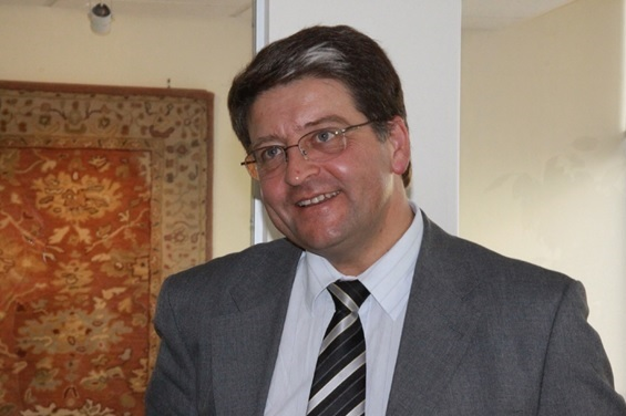 Dr. Felipe Michelini